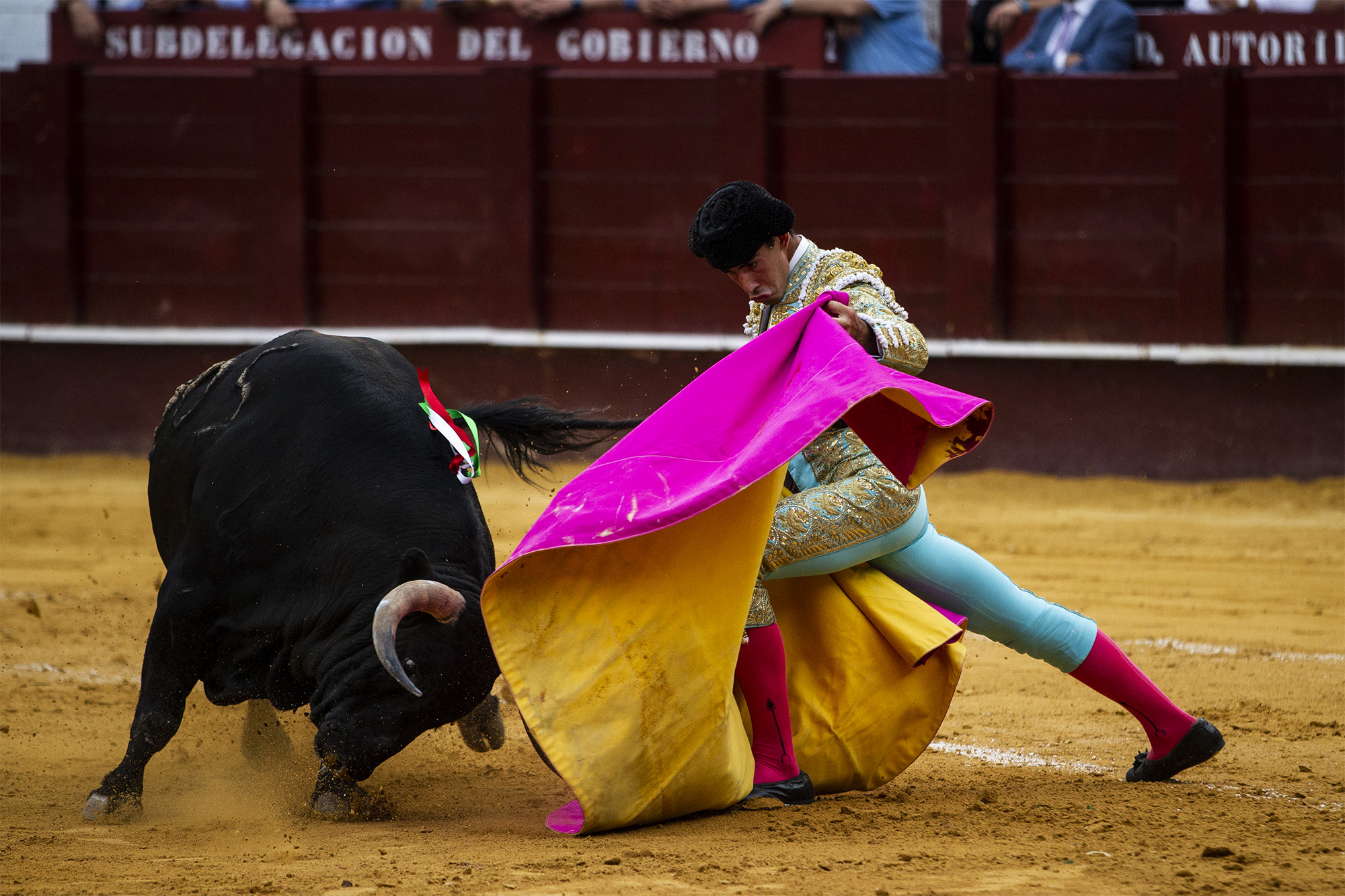 El pase por bajo con la capa implica el compás más abierto posible, incluso llegando a la rodilla en tierra.